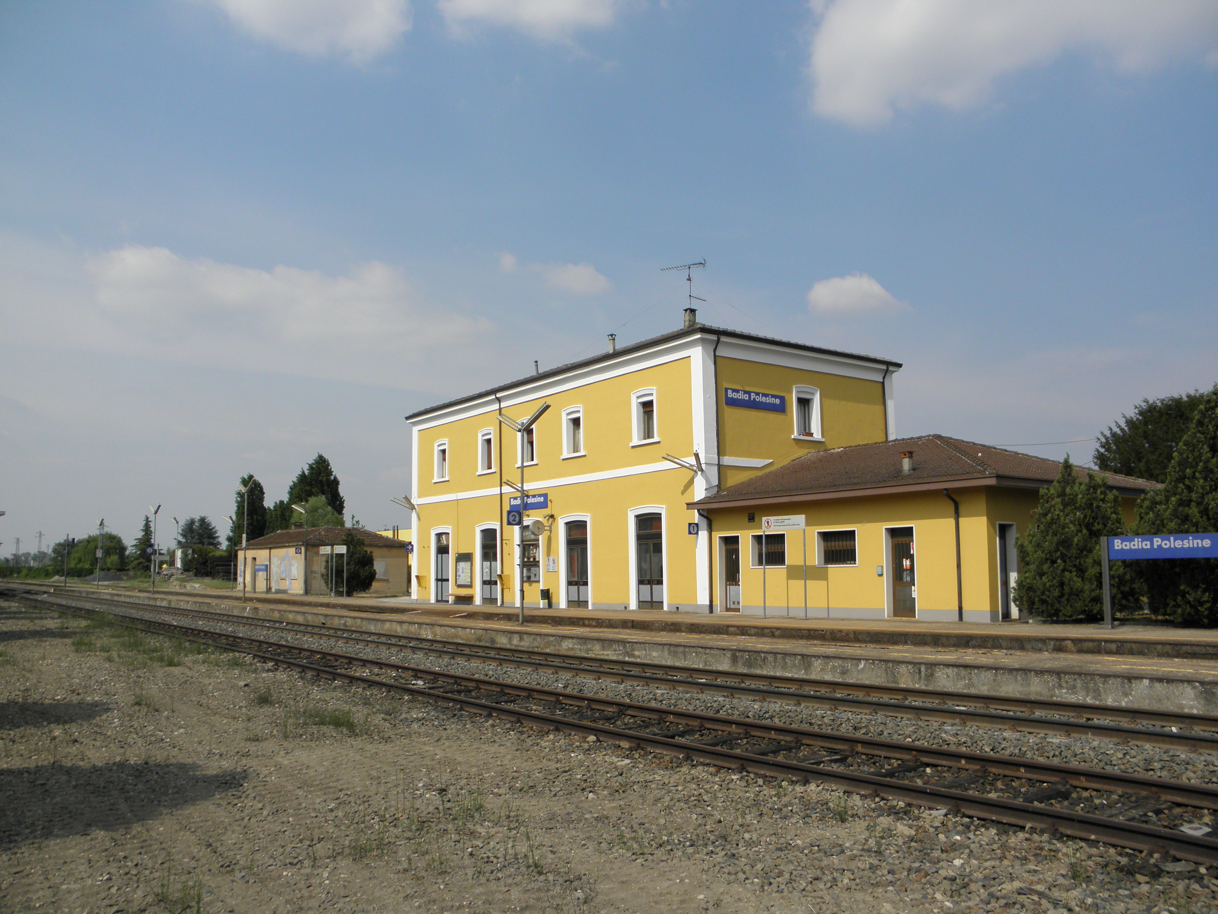 Badia Polesine: il fabbricato viaggiatori della stazione ferroviaria, lato del ferro.